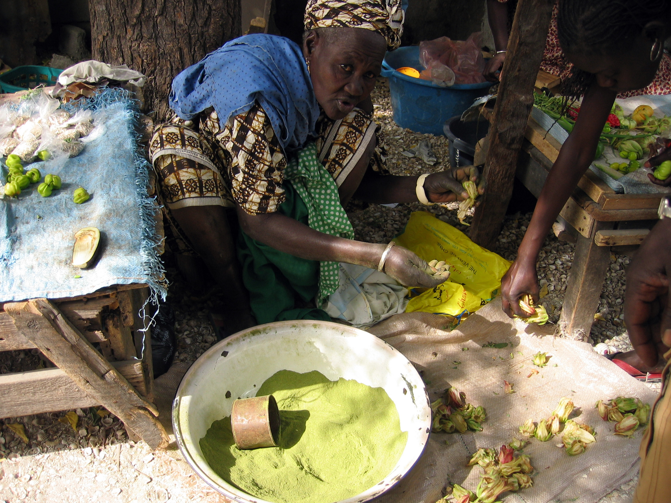 Vente de lalo (poudre de feuilles de baobab séchées) sur un marché de Joal-Fadiouth (Sénégal)